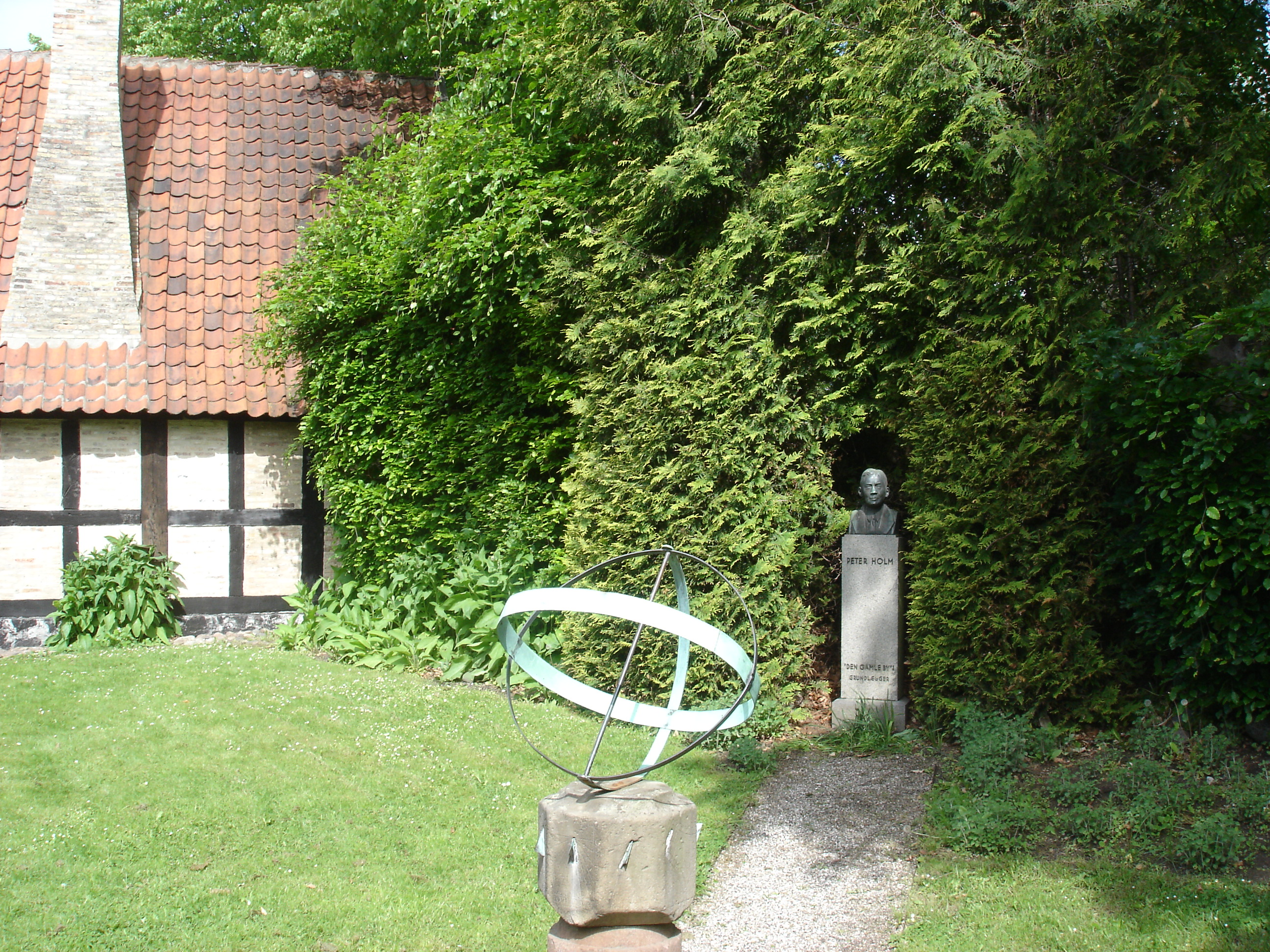 Elias Ølsgaards portrætbuste af museumsdirektør Peter Holm i Borgmestergårdens have i Den Gamle By, som han grundlagde